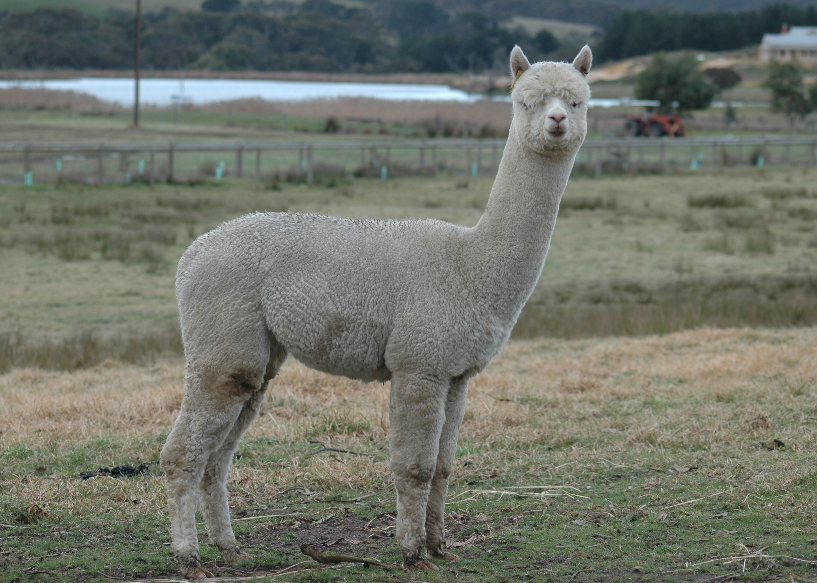 Vicugna pacos